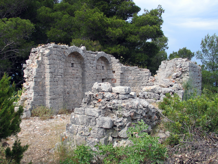 Ostaci predromaničke crkve sv. Vida na brdu Hum iznad starigradskog polja na Hvaru